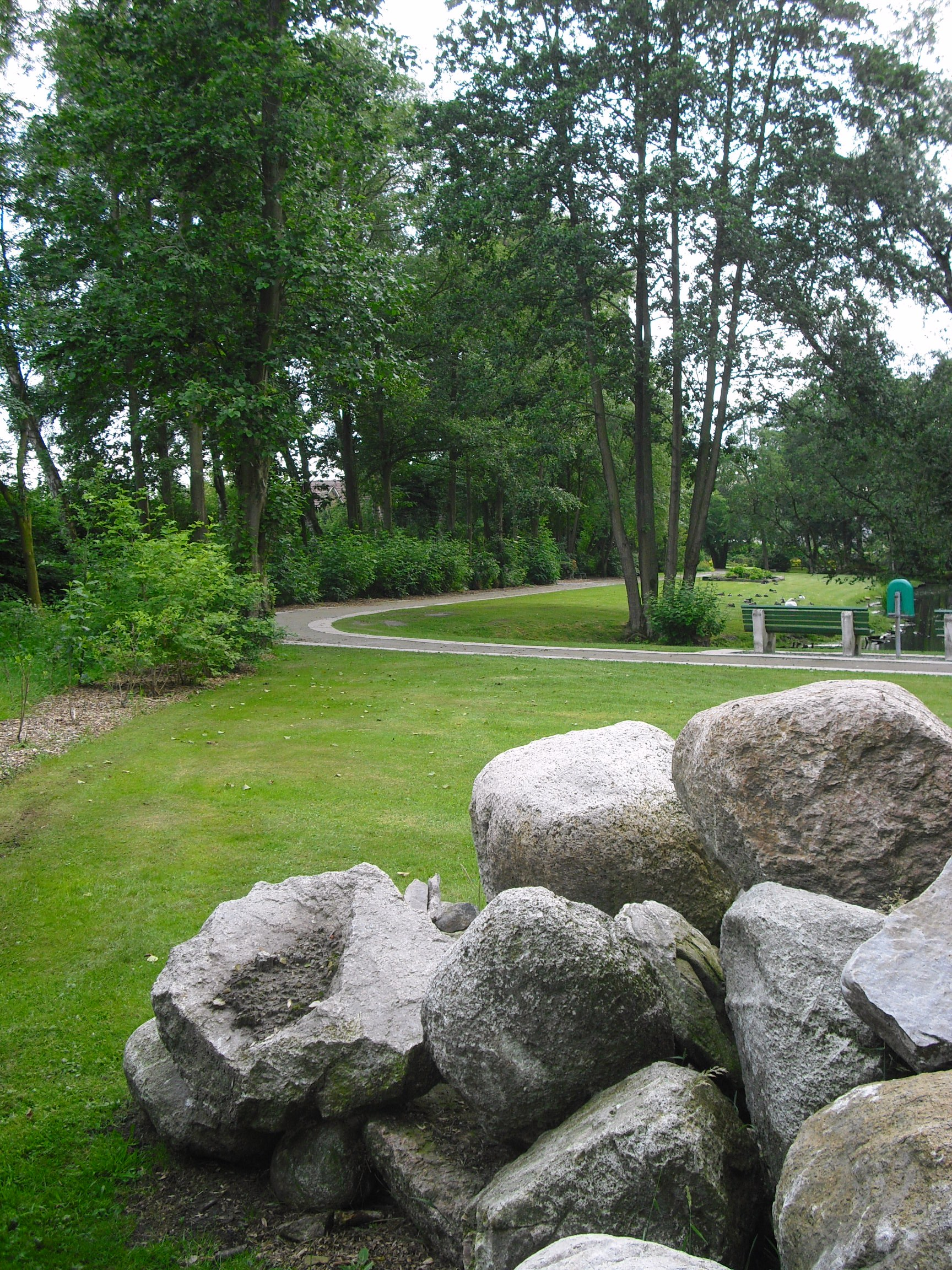 Schlosspark Wittmund (Deutschland, Niedersachsen, Ostfriesland, Landkreis Wittmund)